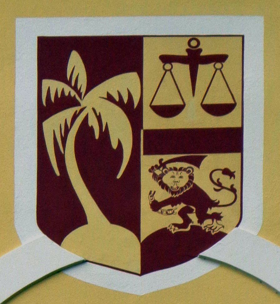 Spitzvilla bei Traunkirchen: Wappen des Rudolf Freiherrn von Slatin